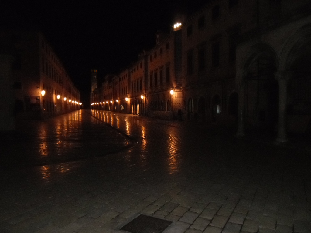 glavna dubrovačka ulica Stradun navečer sredinom siječnja 2014.